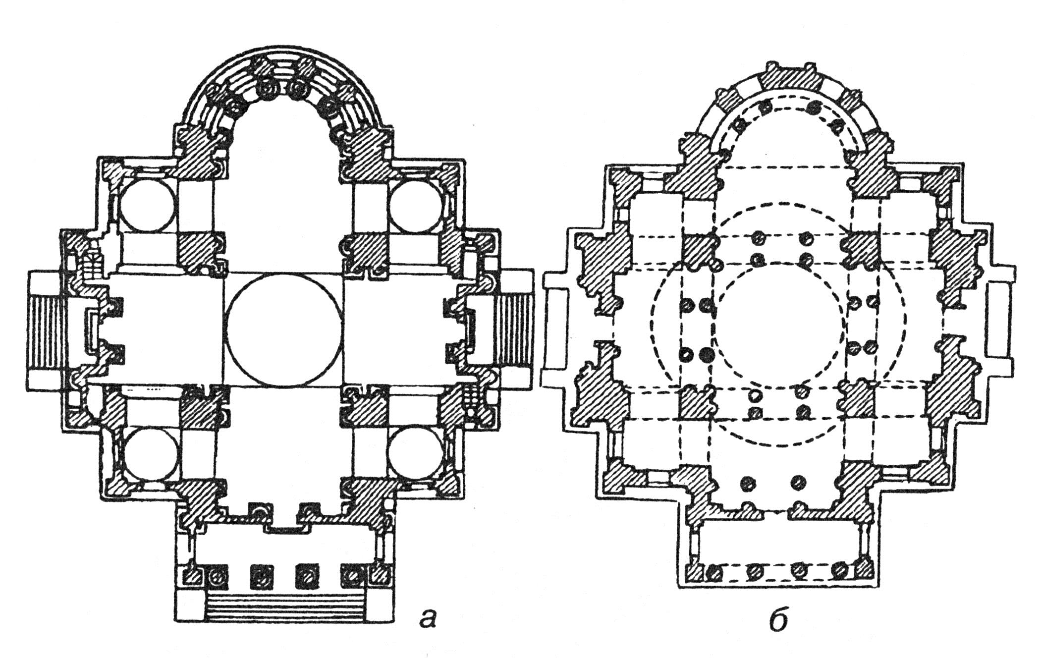 план схема